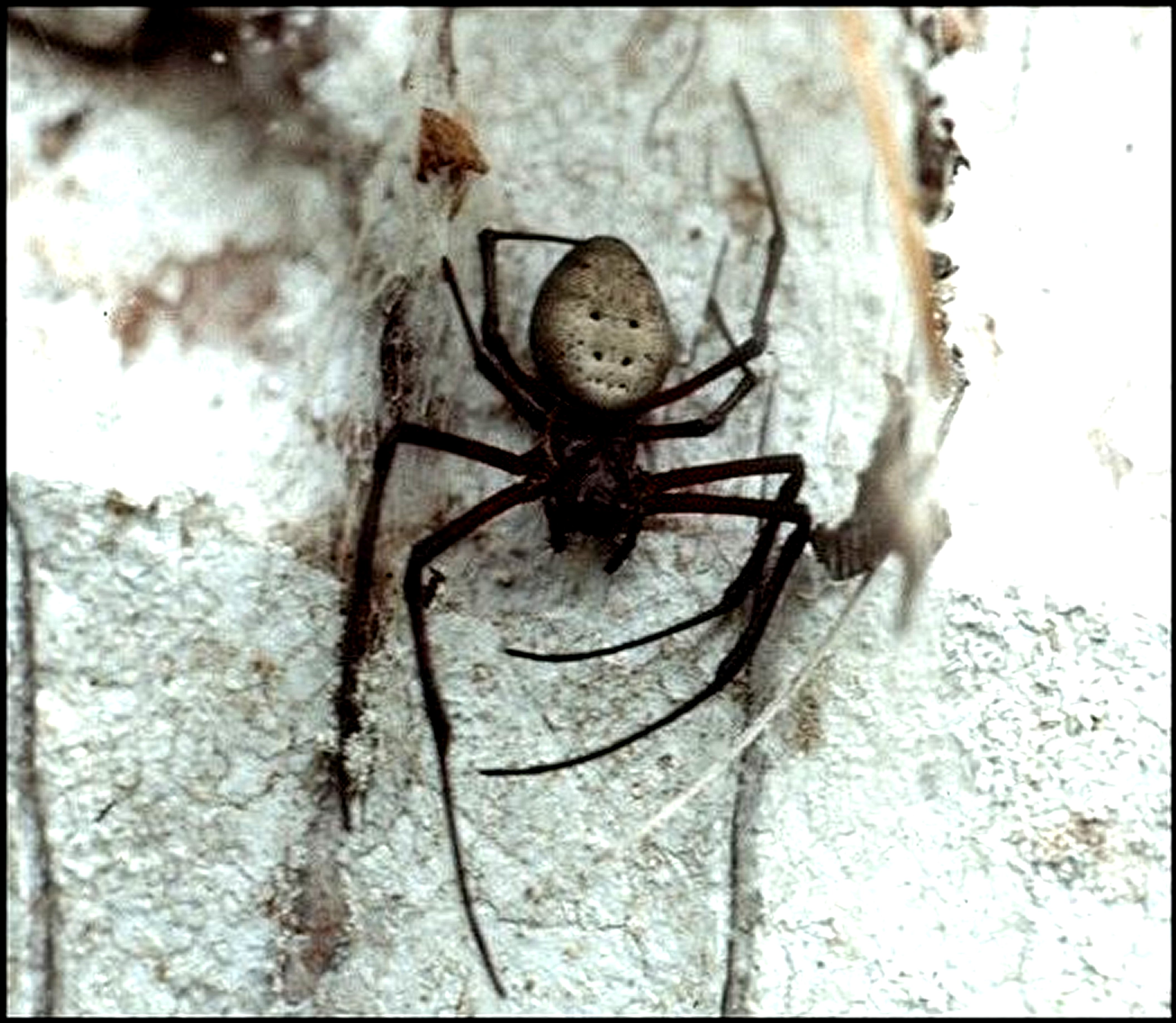 Nephilingis livida, femelle dans sa retraite sur un tronc de Cocotier, vue dorsale. Bord de plage, Mahé, Seychelles.